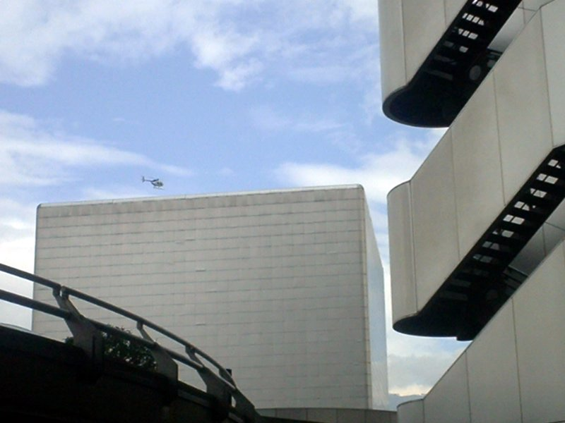 El edificio en forma de cubo es el auditorio del edificio de las EE.PP.MM. en Medellín